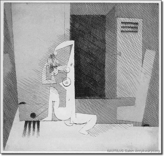 La Toilette de la Mariee, ok. 1934 Akwaforta; wym.: 185 x 173 mm [plansza 410 x 330], sygn. ś.d. oł.: L.M. Grafika z cyklu Theatrales pour M. G. (plansza IV). Stan bardzo dobry. Lit.: J. Lafranchis, Marcoussis, Paris 1961